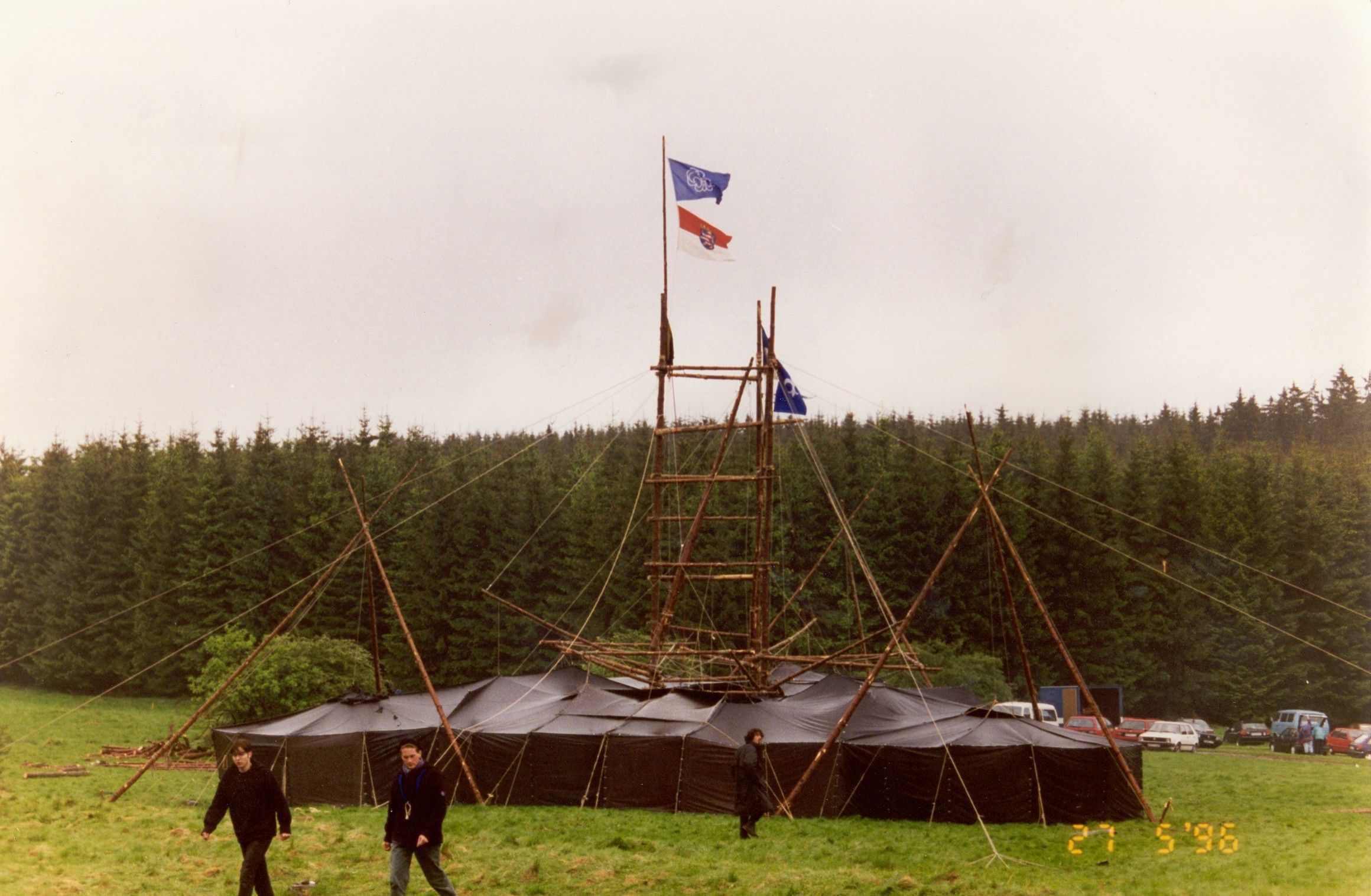 eine Jurtenburg 1996, my picture